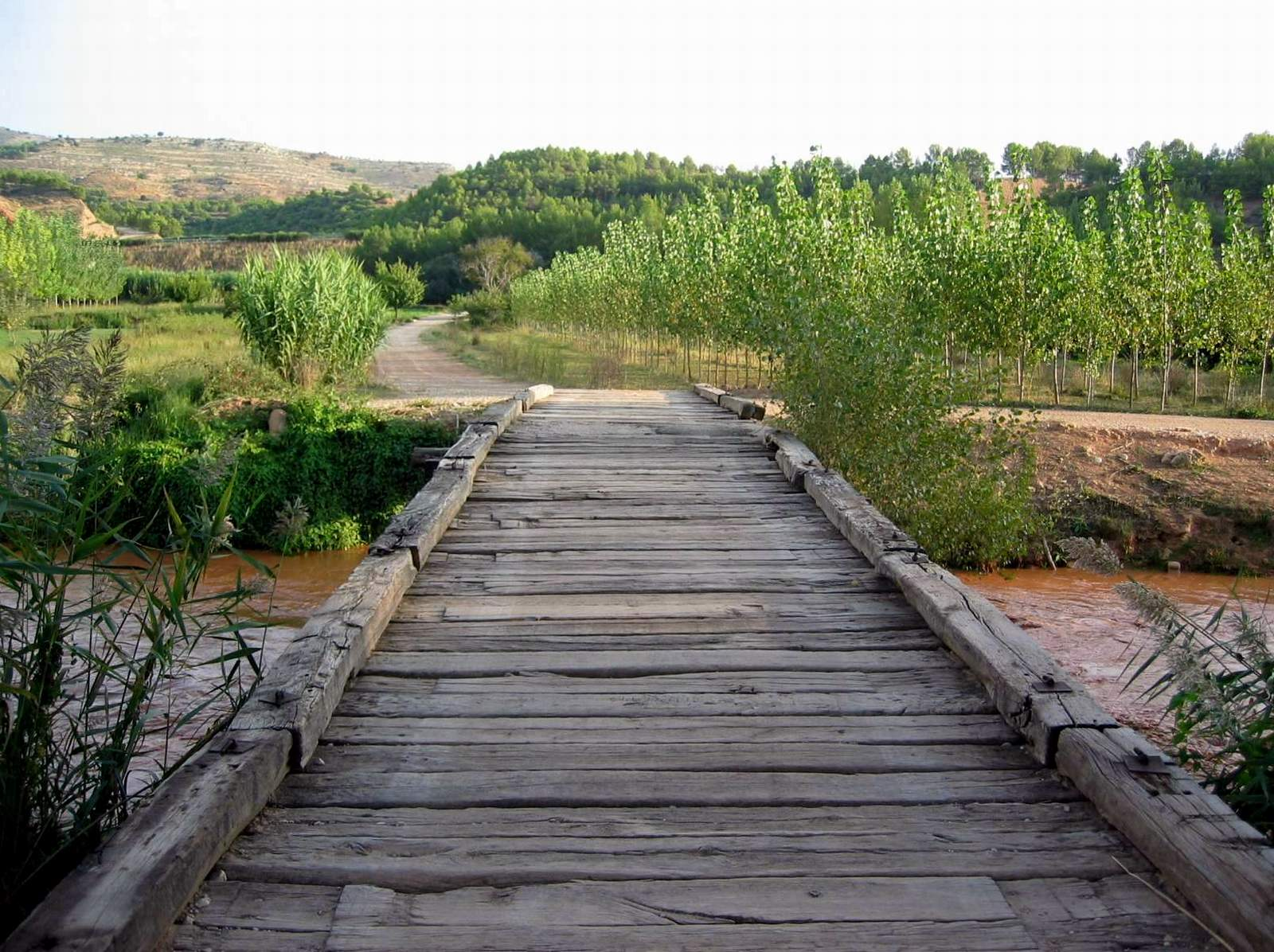 Detalle del Puente de Guerrero sobre el Turia, dirección Ademuz.